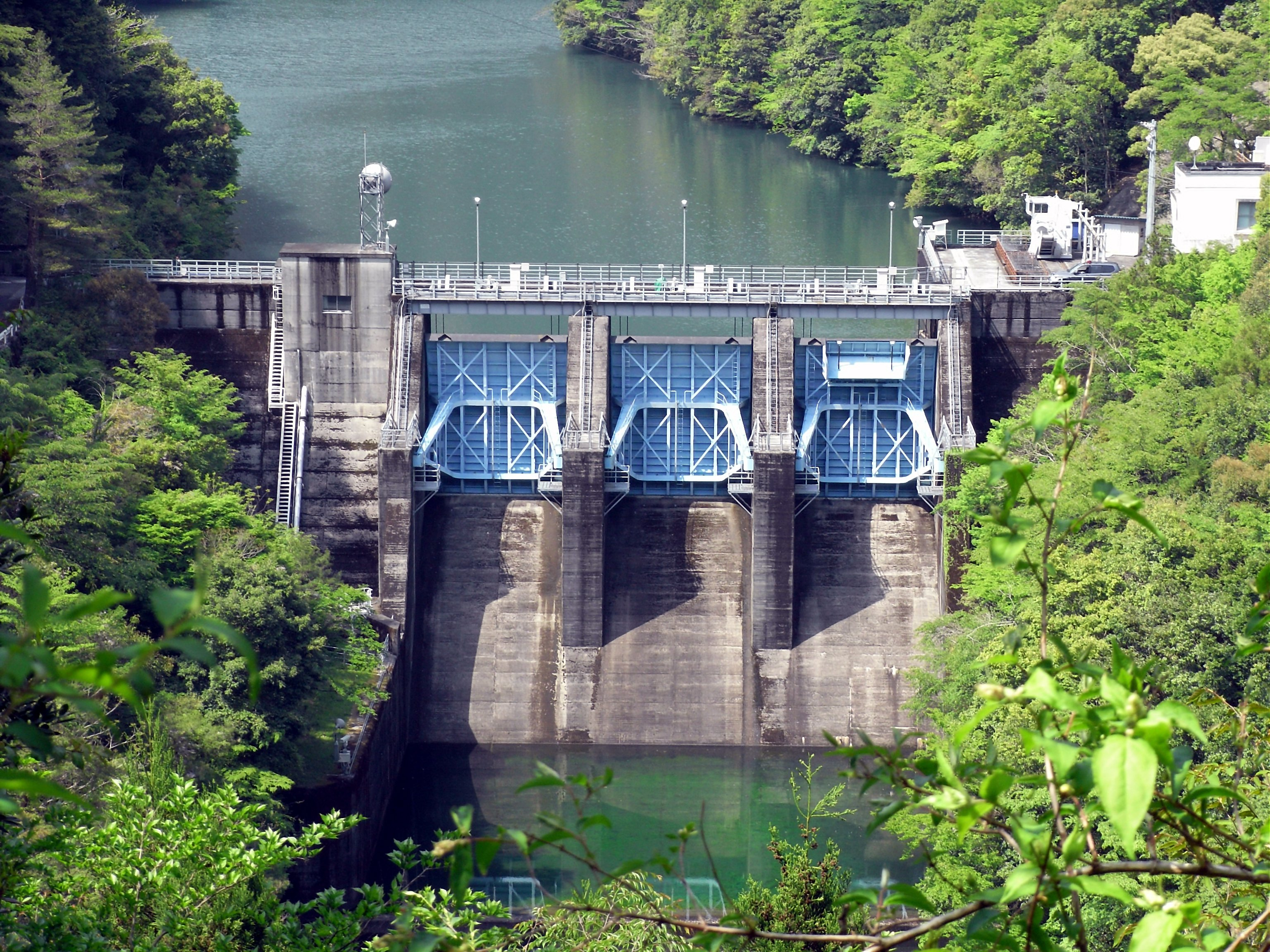 Dam